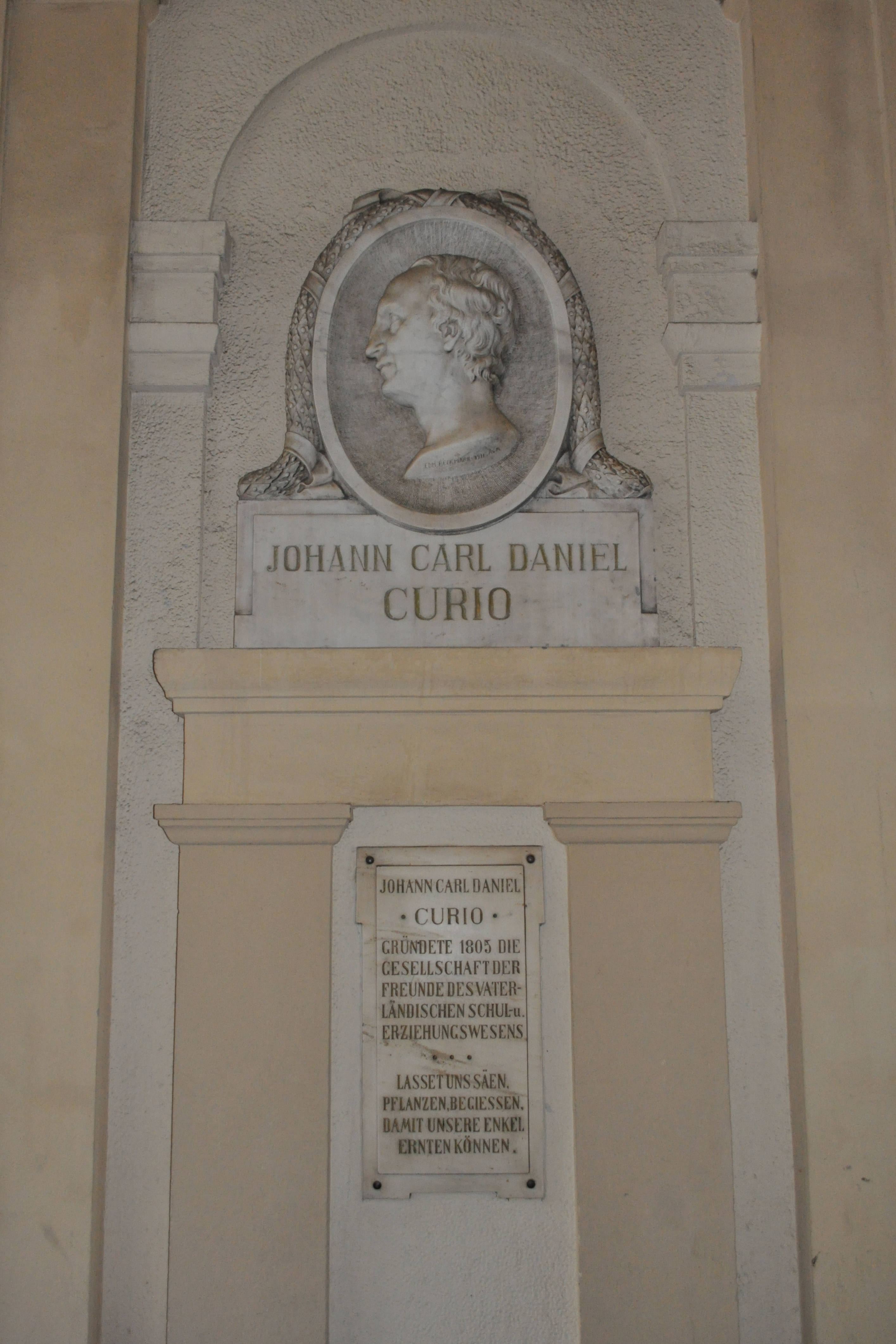 Bildnis-Büste von Johann Carl Daniel Curio (1911) des deutschen Bildhauers Edmund Beckmann (1885-1957) im Eingangsbereich des Curio-Hauses an der Rothenbaumchaussee 11-17 in Hamburg-Rotherbaum. Details: Edmund Beckmann bei Rump/Bruhns: Der neue Rump. Lexikon der bildenden Künstler Hamburgs, Wachholtz Verlag, Neumünster/Hamburg 2013, ISBN 978-3-529-02792-5, S. 35, rechte Spalte.